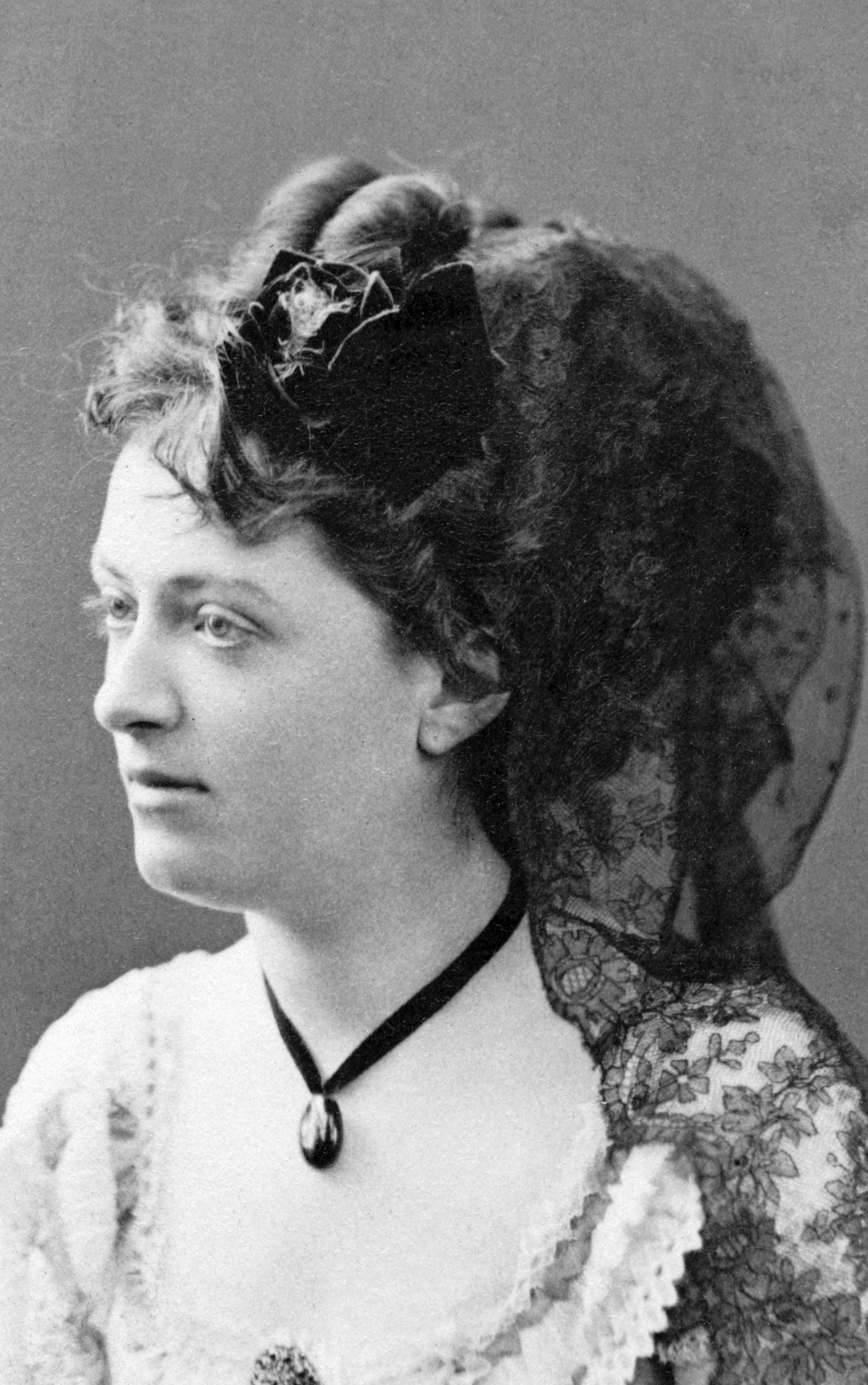 Hilma Tengmark, skådespelare vid Kungliga Dramatiska teatern 1870